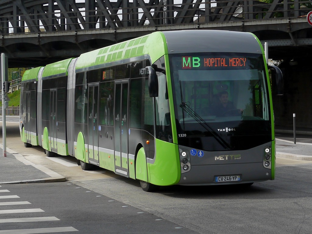 Van Hool Exquicity sur la ligne B du BHNS de Metz